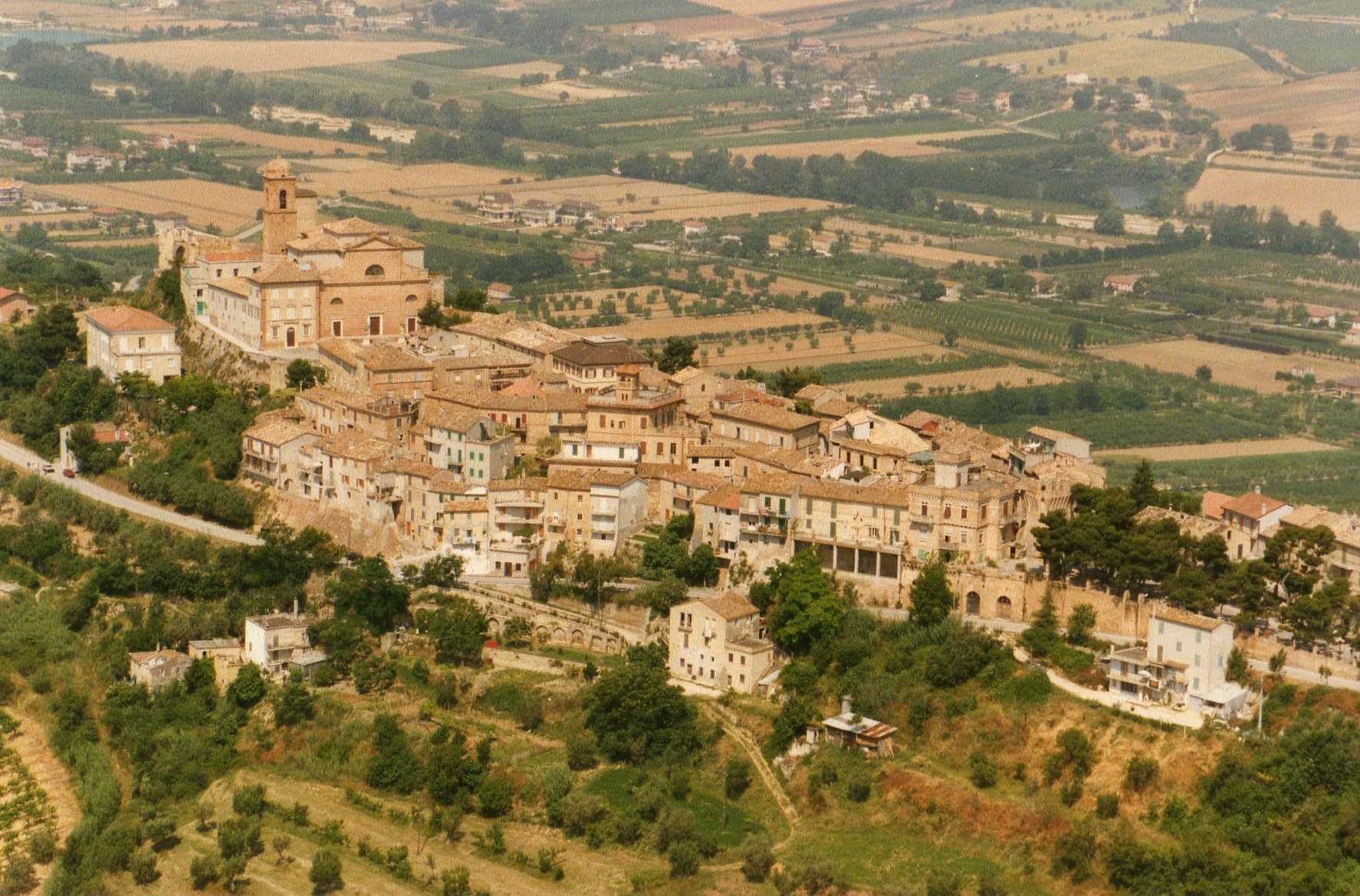 Campofilone dall'alto